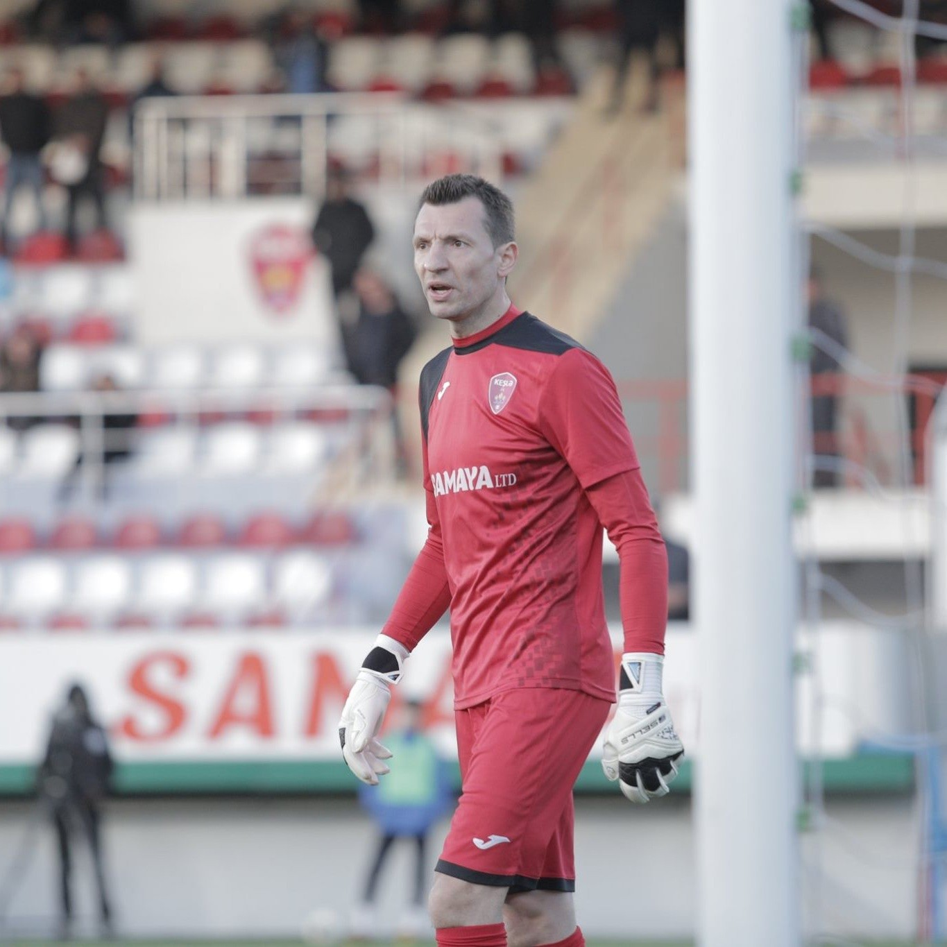 Игра с командой Зире